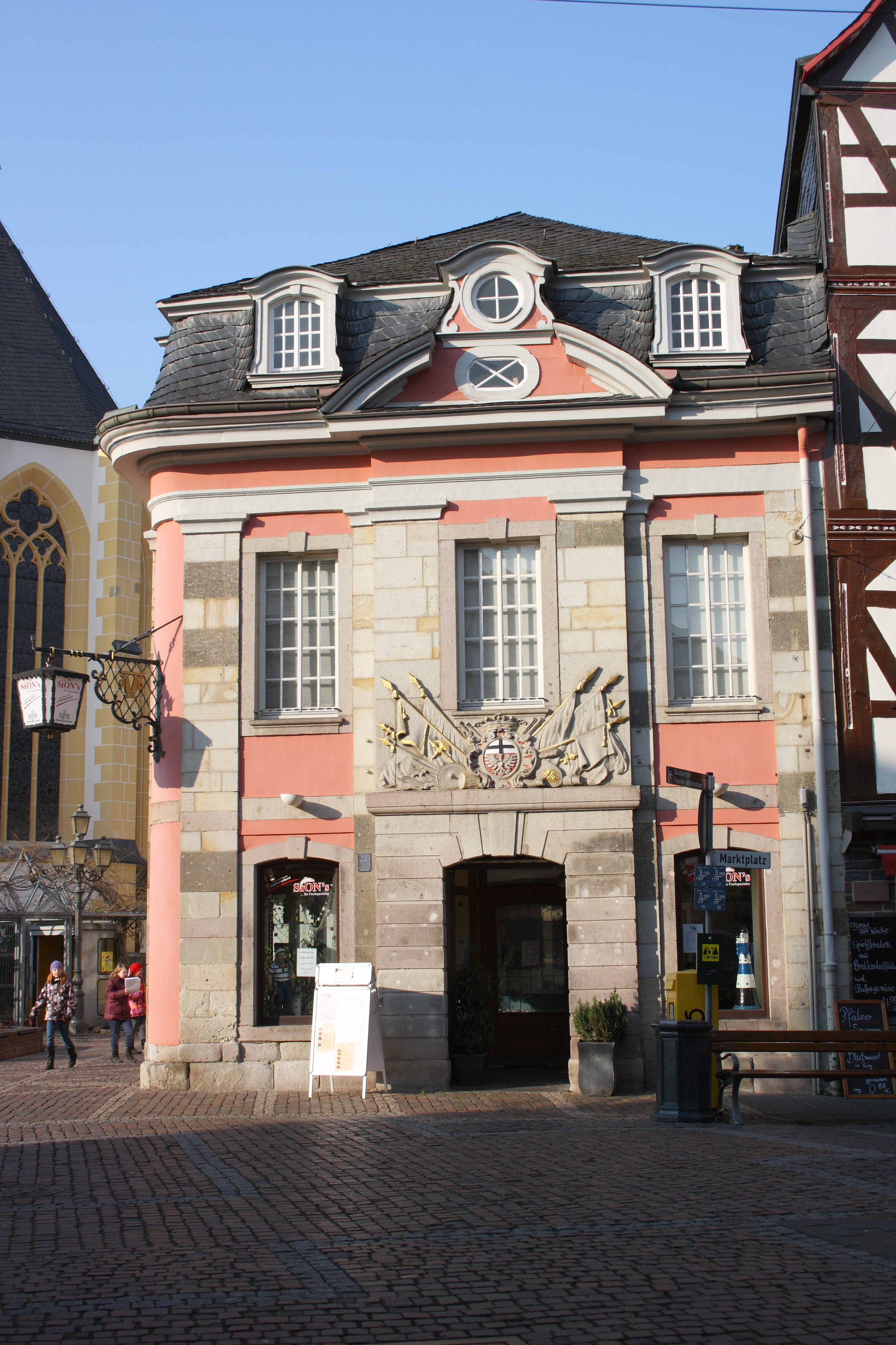 ehemalige Stadtwache in Ahrweiler, Marktplatz 28